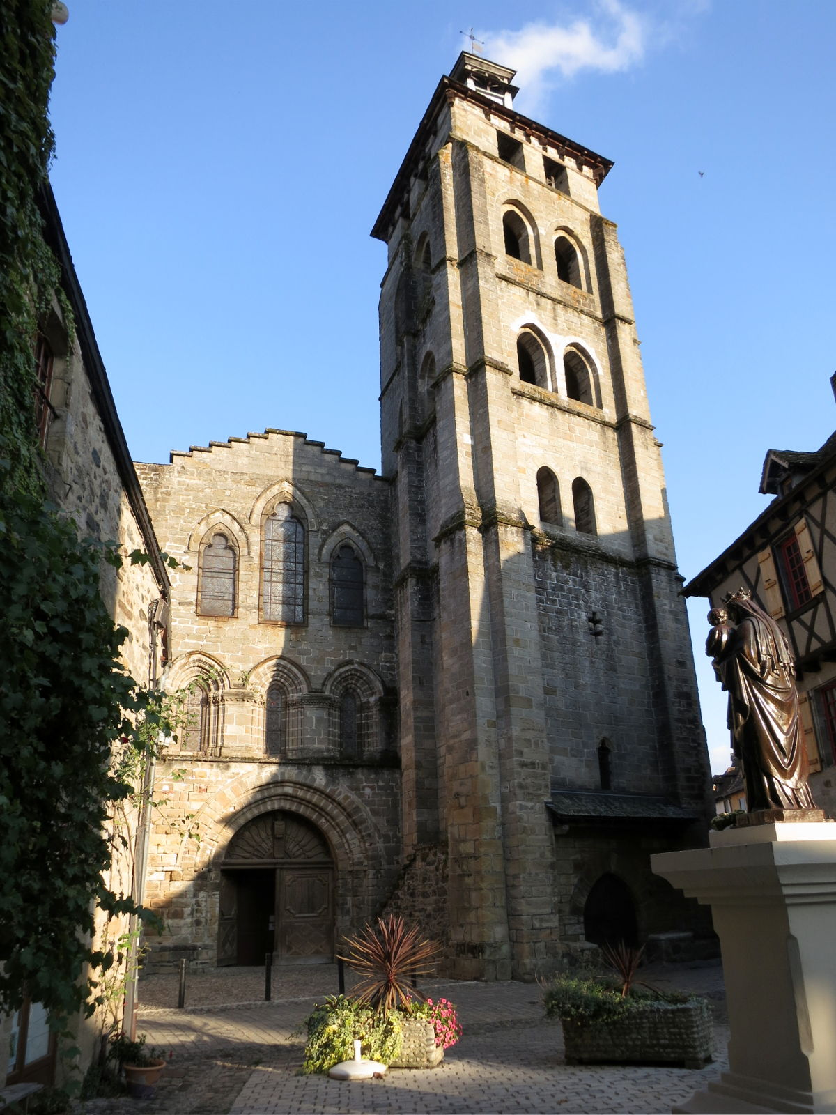 Beaulieu sur Dordogne, église Saint Pierre